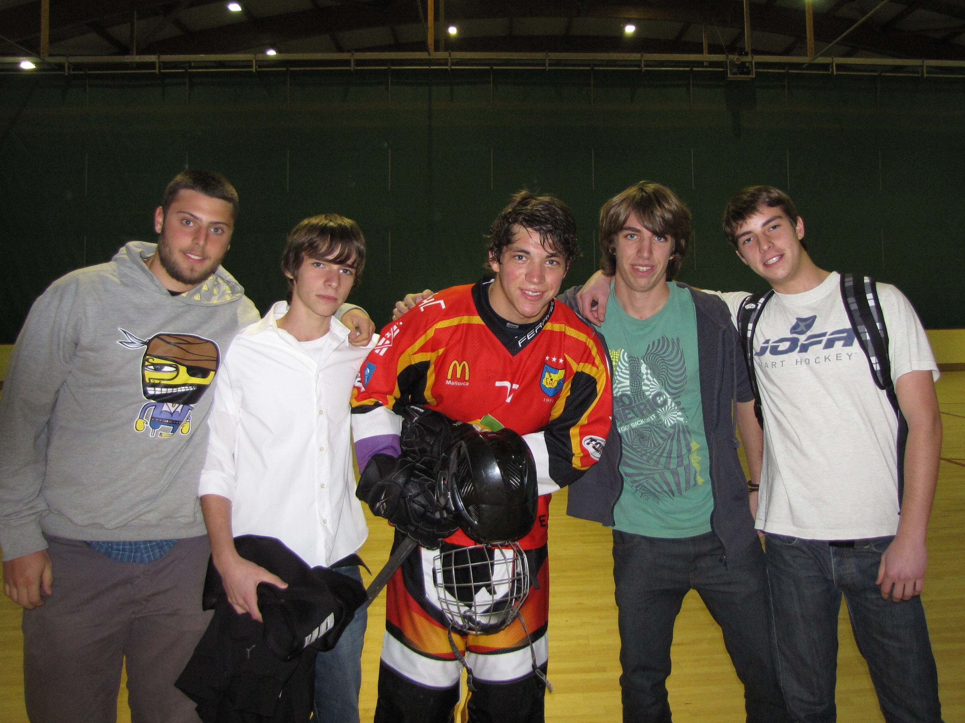 Itan Chavira (en medio) y unos seguidores